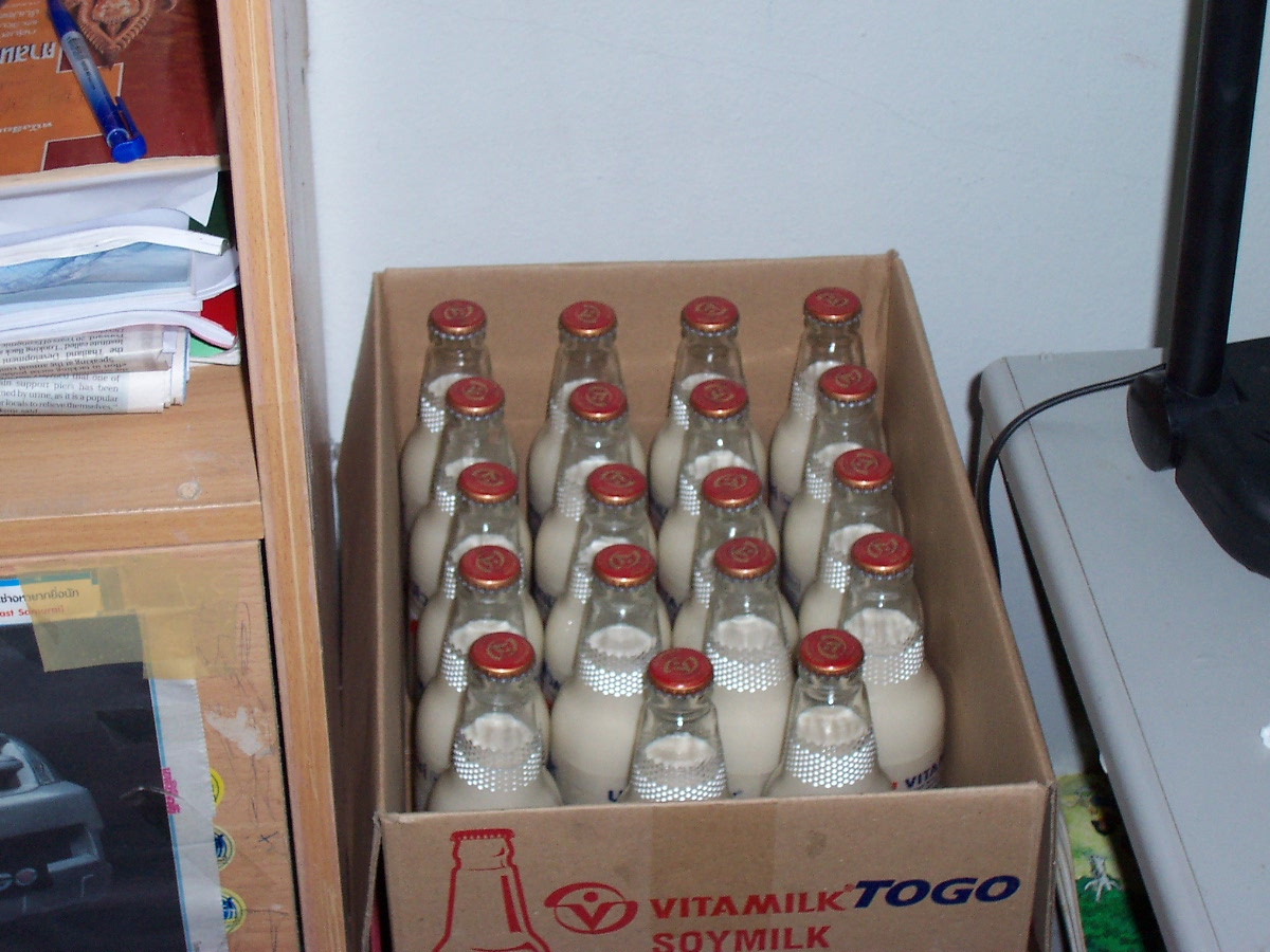 "Vitamilk" (ไวตามิลค์) Soy milk bottles